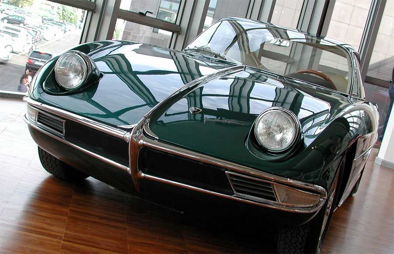 Lamborghini GTV